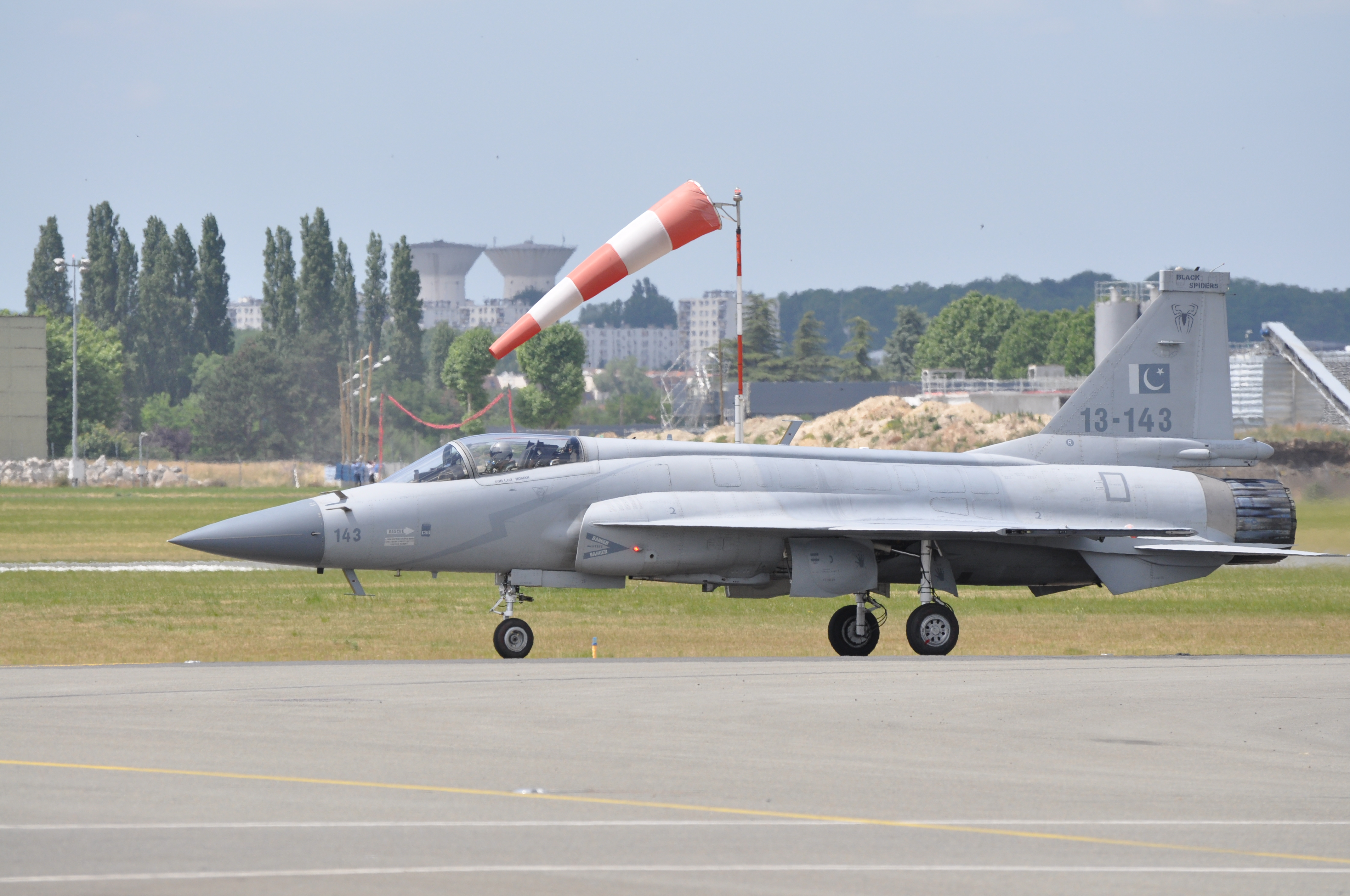 SIAE 2015 LBG AIRPORT